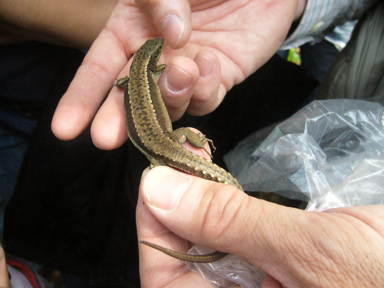 Iberolacerta monticola in Natural Park of Fragas do Eume, Corunna, Galicia, España.